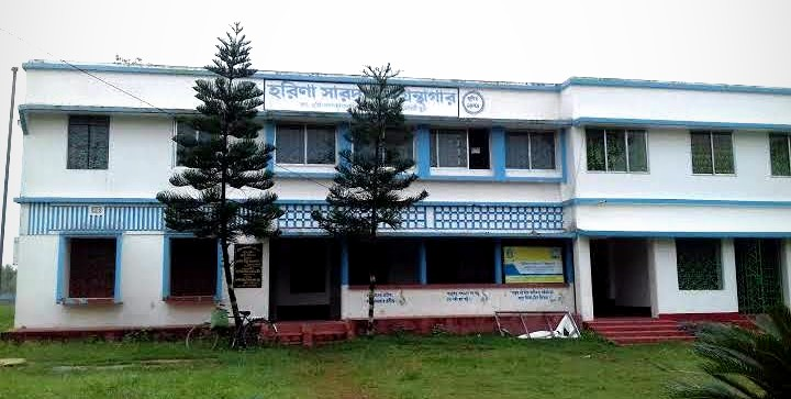 হরিণা পাশদল বাড়